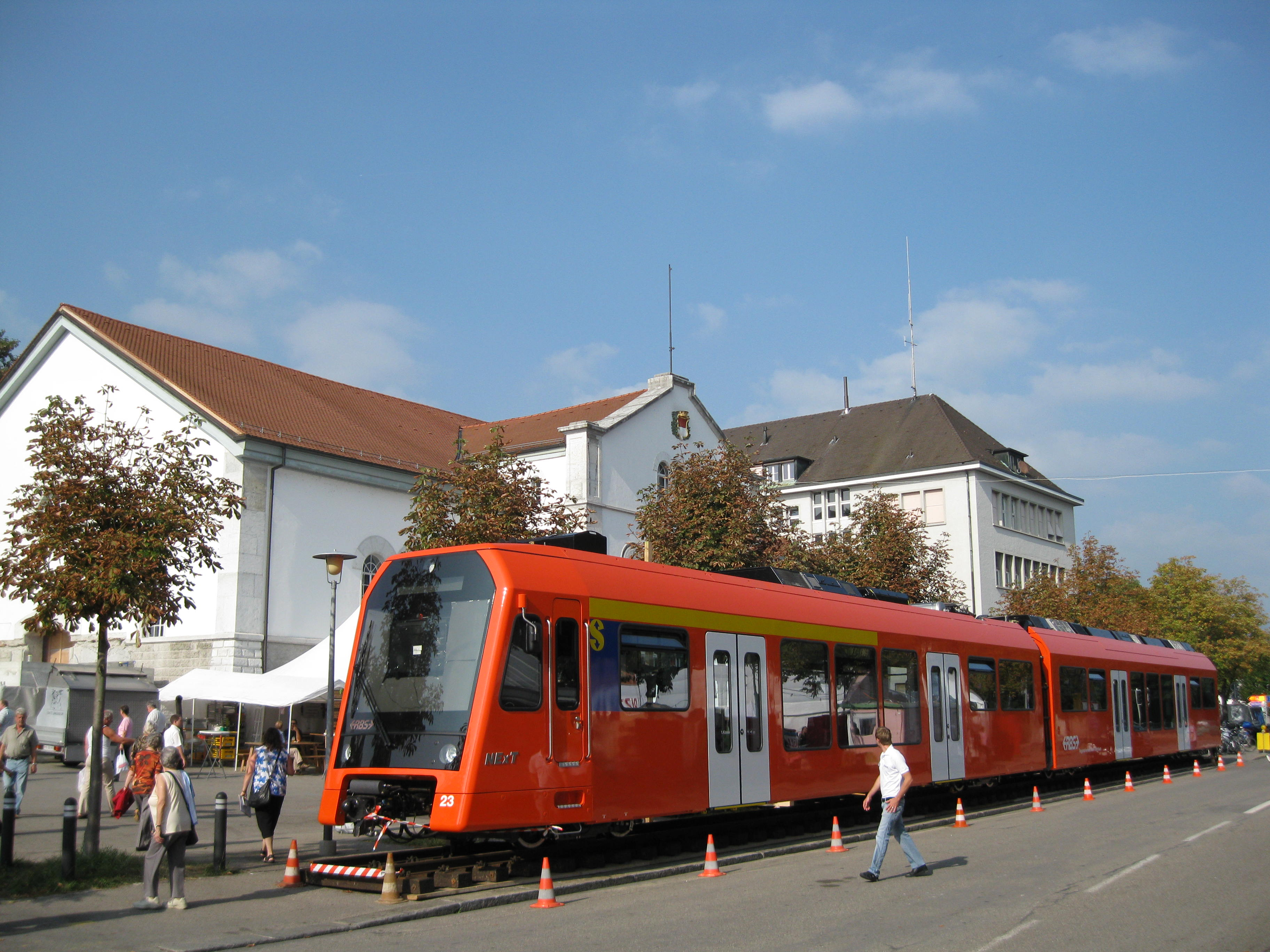 Neuer RBS Zug 2009 an der Heso ausgestellt